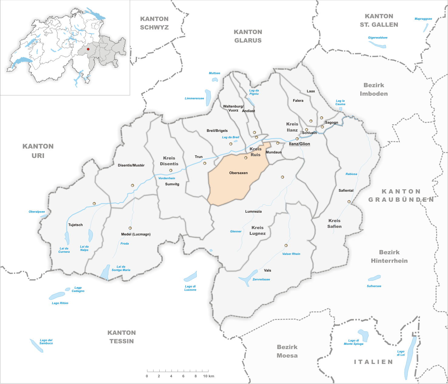 Municipality Obersaxen